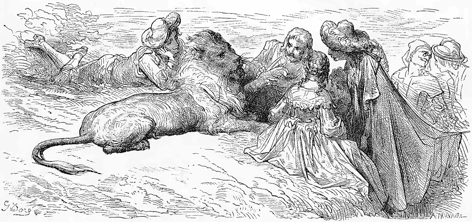 grafika z książki PL Bajki, Jean de La Fontaine, nakładem i drukiem Jana Noskowskiego, Warszawa 1876